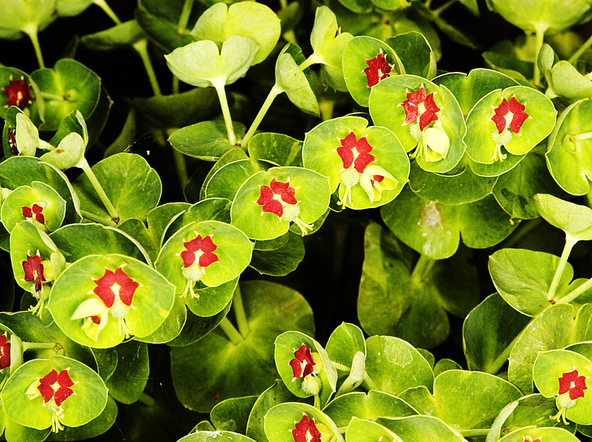 Euphorbia x martinii